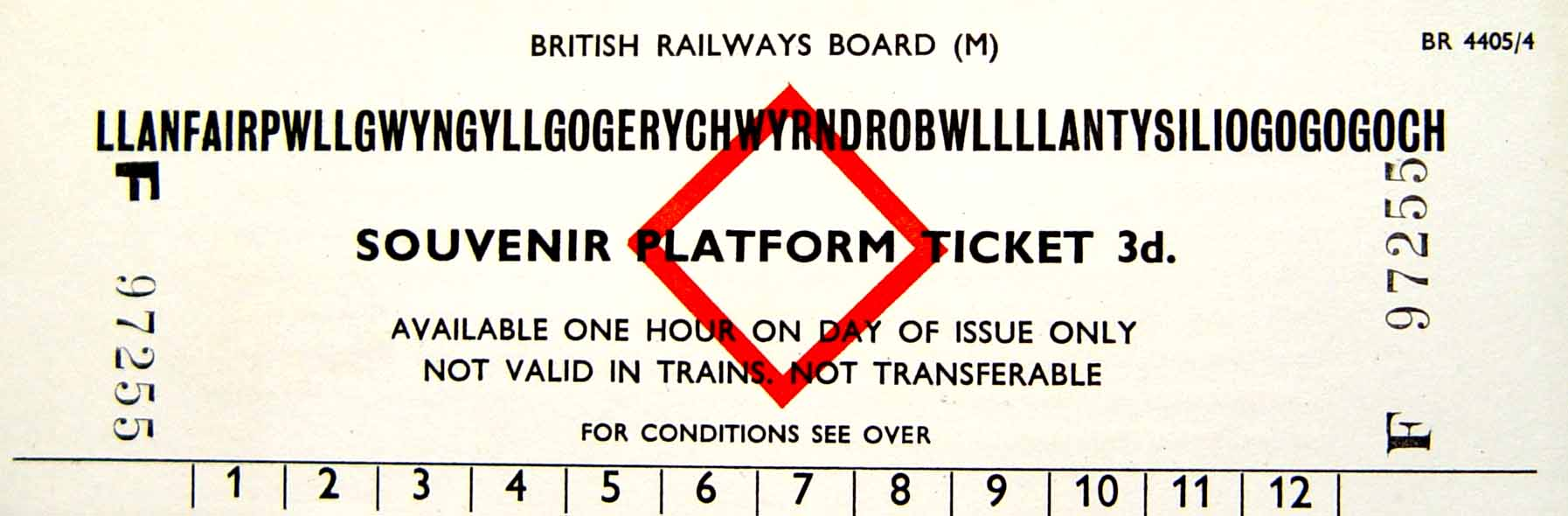 Quaibilljee Llanfairpw.